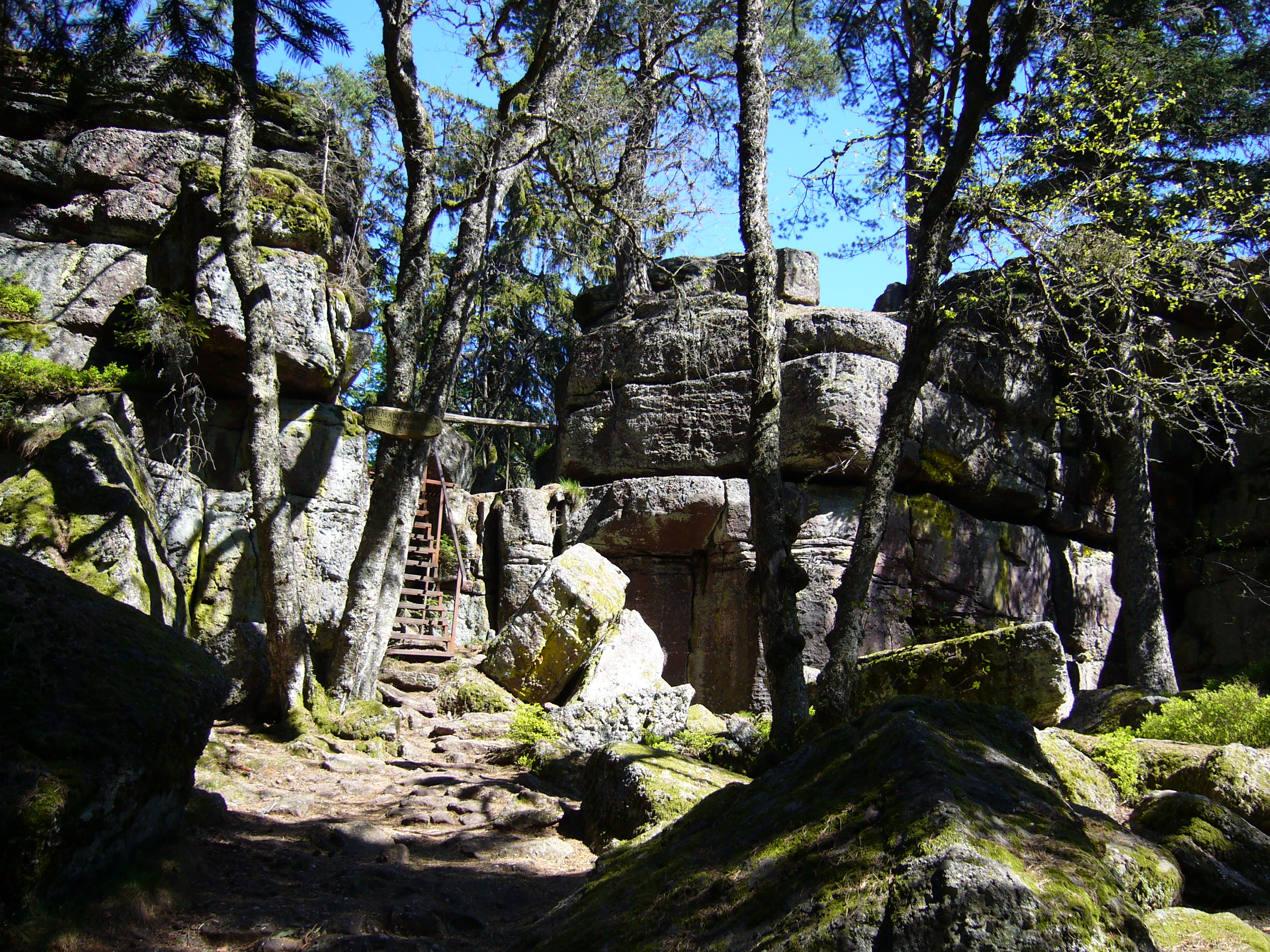 Taennchel 431.JPG